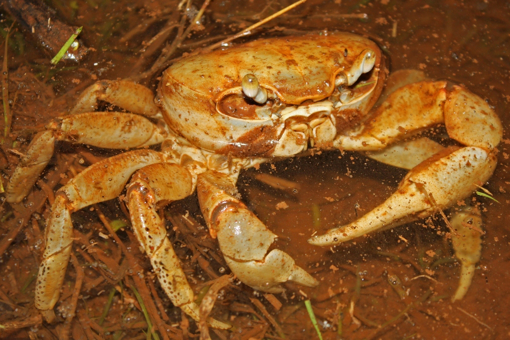 La Boca, Sancti Spíritus province.